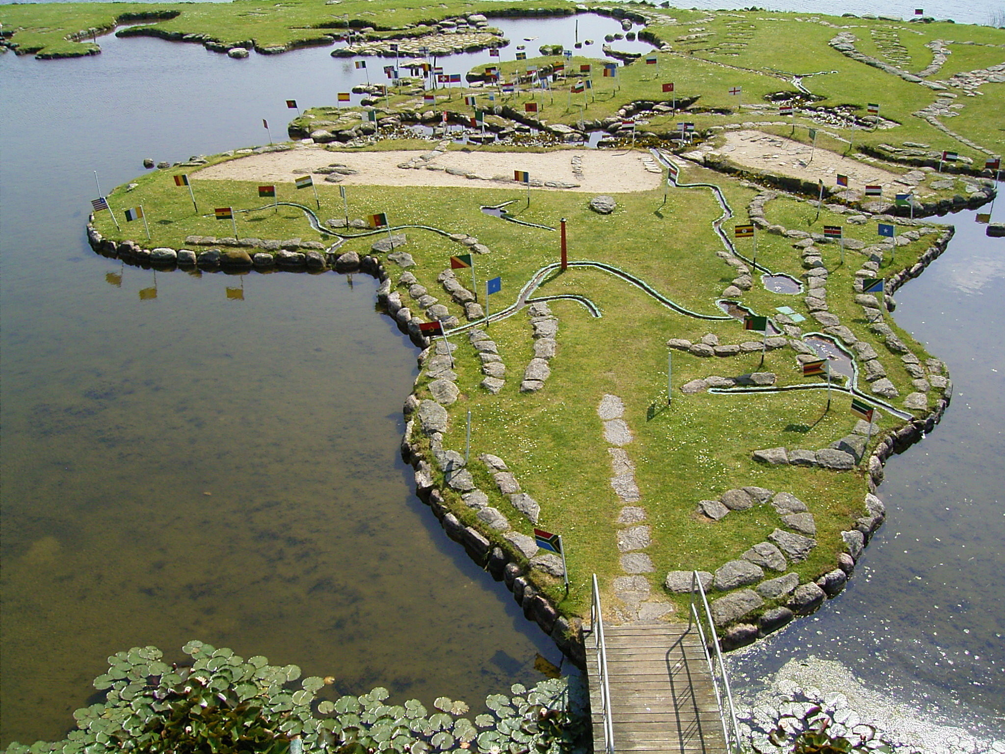 Verdenskortet, a world map park at the Klejtrup Sø in Klejtrup, Viborg Kommune, Denmark